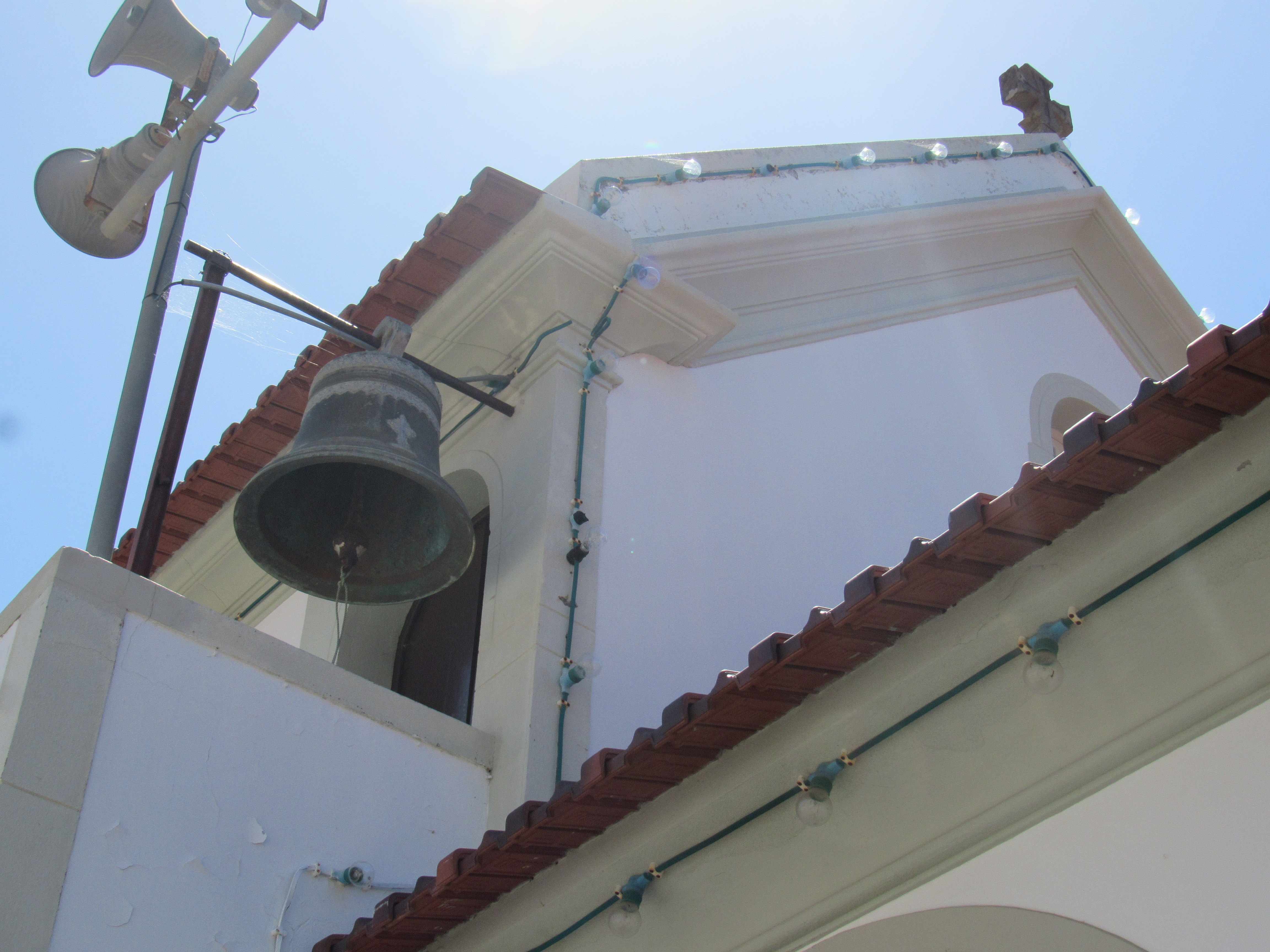 Capela de Nossa Senhora do Livramento situada no sítio do Livramento - Ponta do Sol